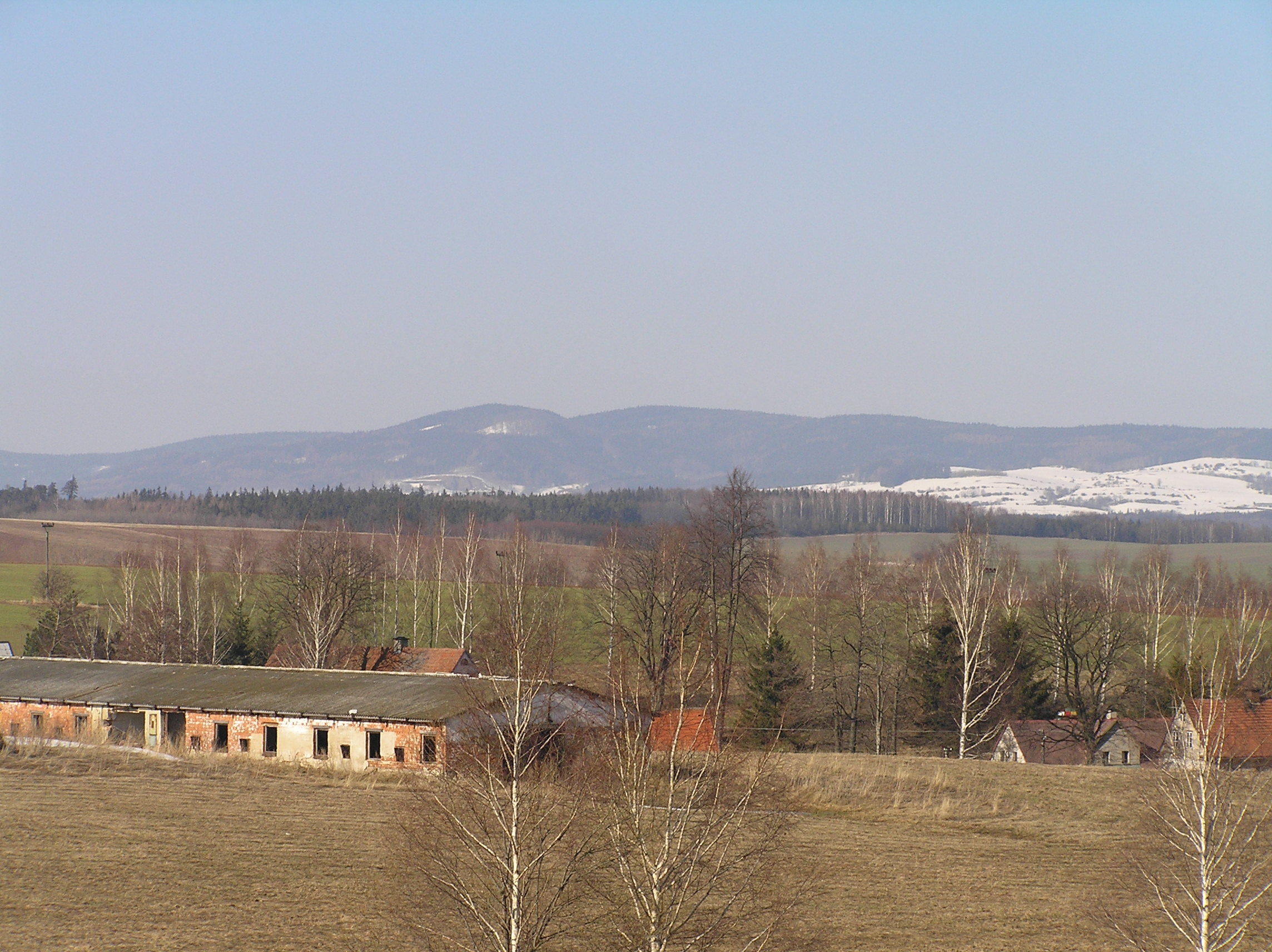 The Javoří hory Mountains